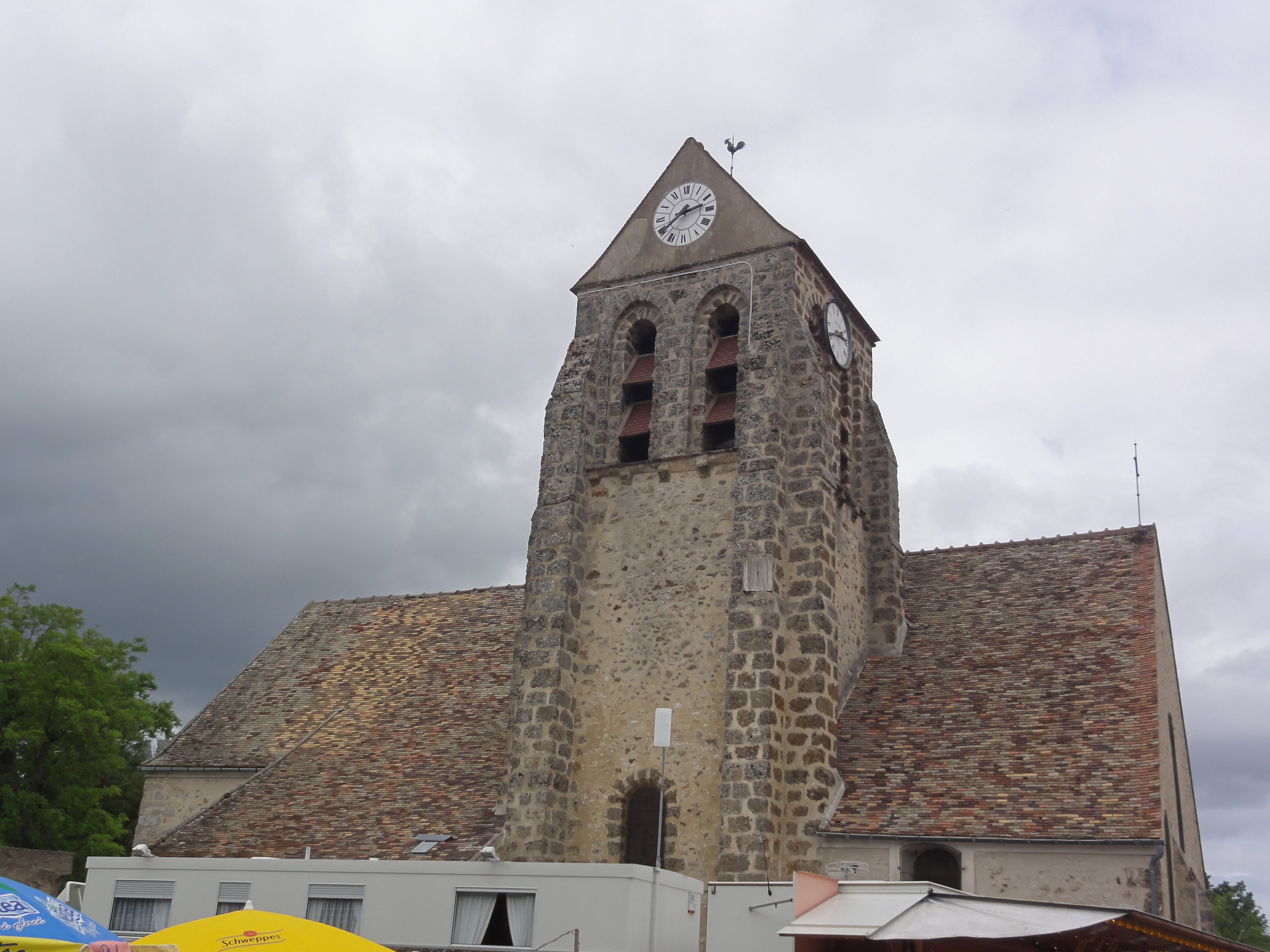 Cheptainville (Essonne) Église paroissiale Saint-Martin .